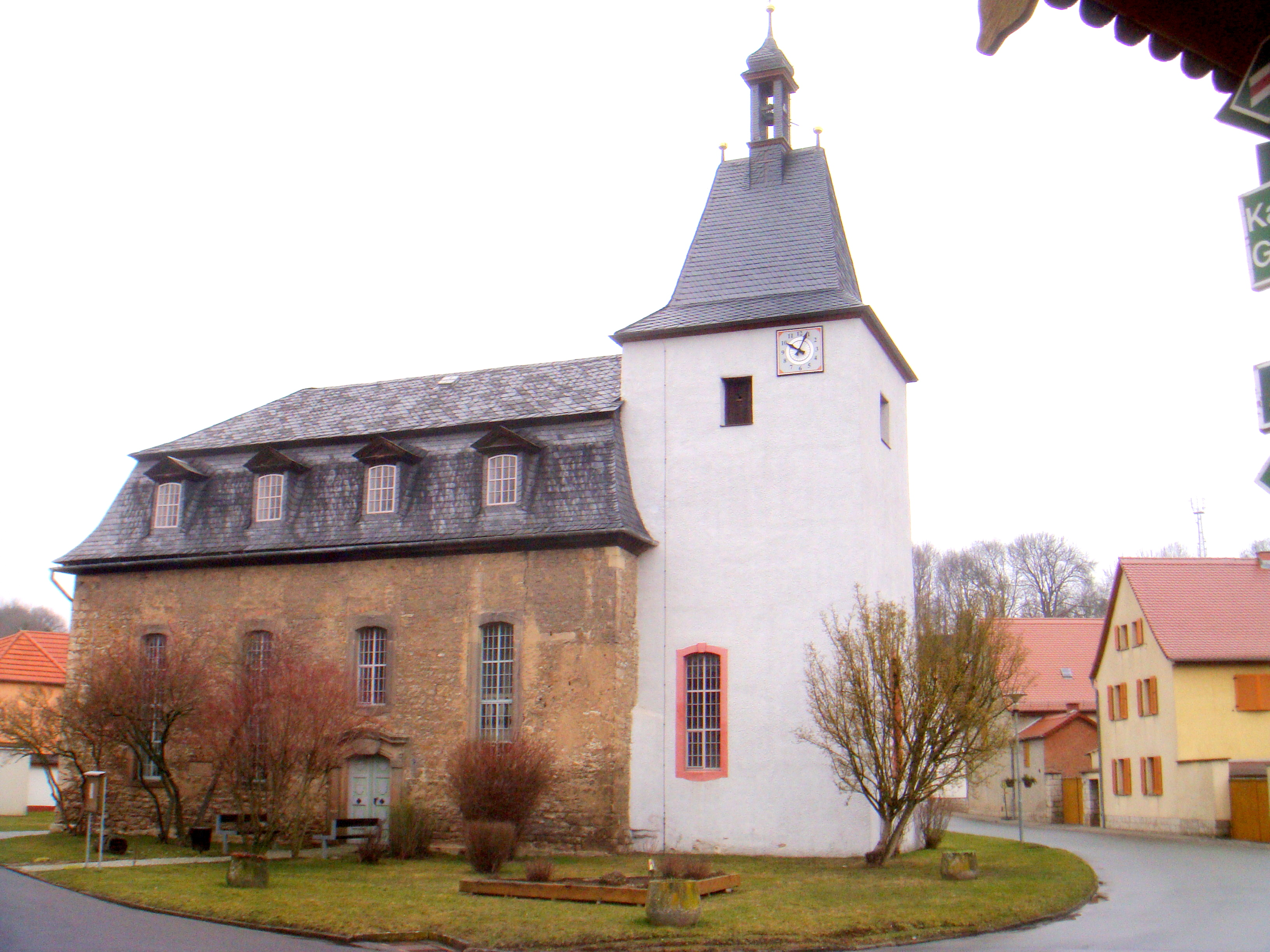 Evangelische Dorfkirche St. Margarete Eberstedt